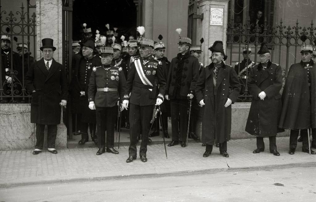 Título original: Autoridades militares a la salida del Palacio Goikoa (2/3) Localización: San Sebastián (Guipúzcoa)